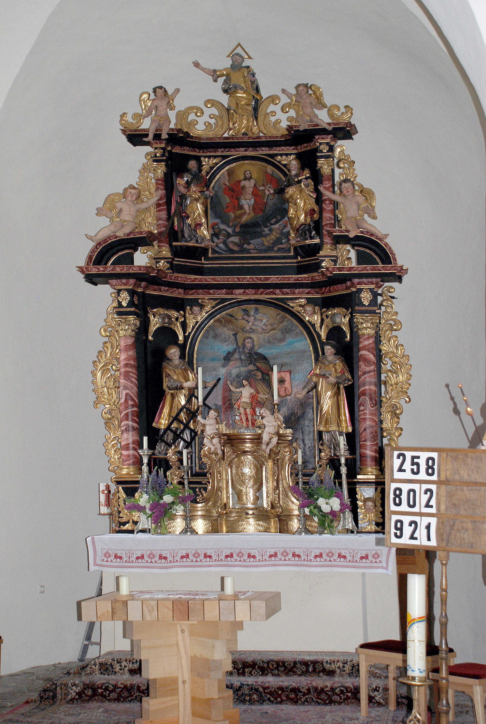 Soboth, Steiermark, Österreich: Pfarrkirche Hochaltar